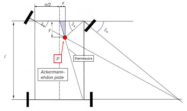 Kuvaus ackermann-ehdosta.